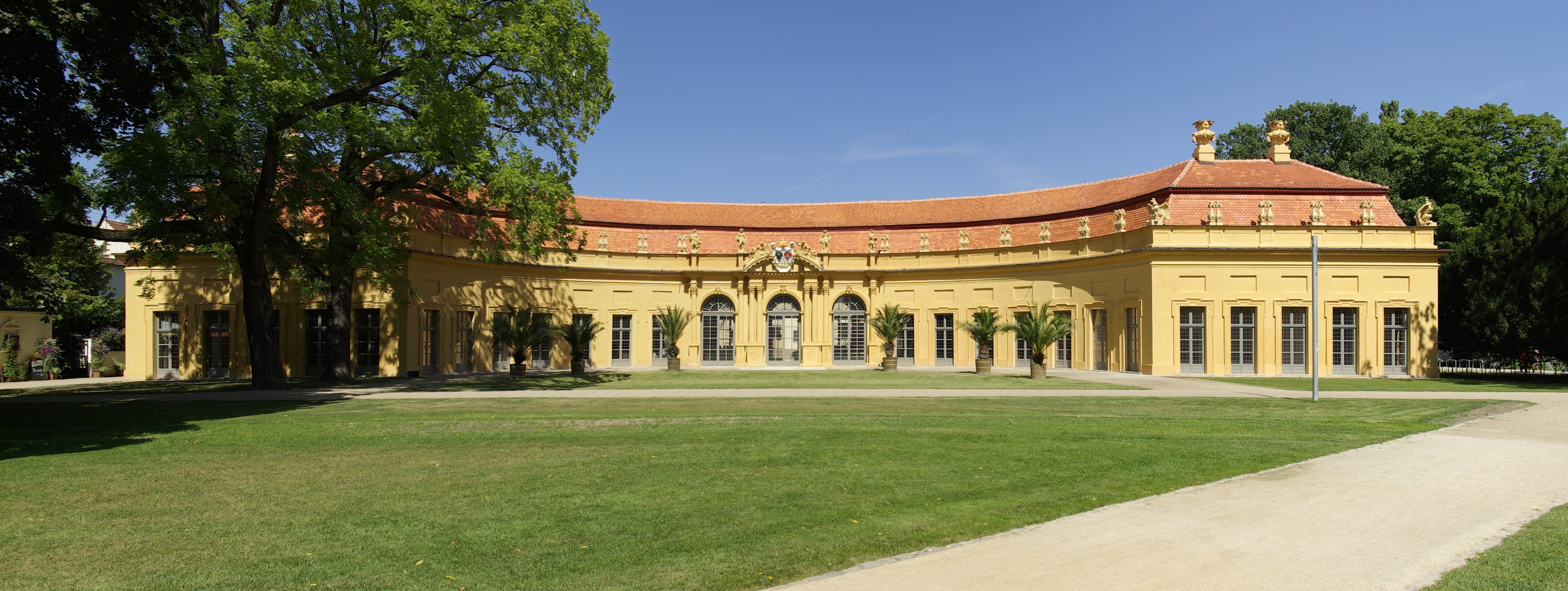 Die Orangerie im Schlossgarten in Erlangen